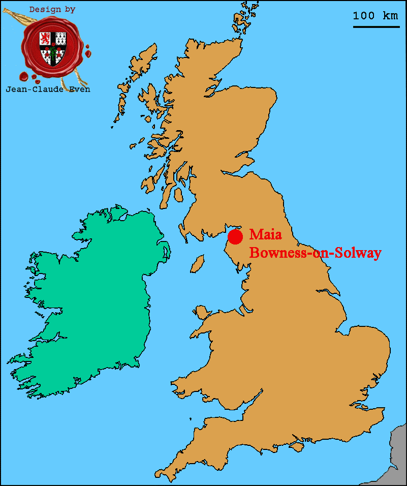 Bowness-on-Solway - Maia